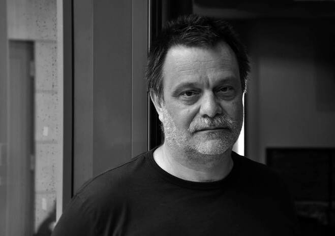 Mohácsi János (Budapest, 1959. december 13. –) Jászai Mari-díjas magyar rendező, egyetemi tanár, színész.